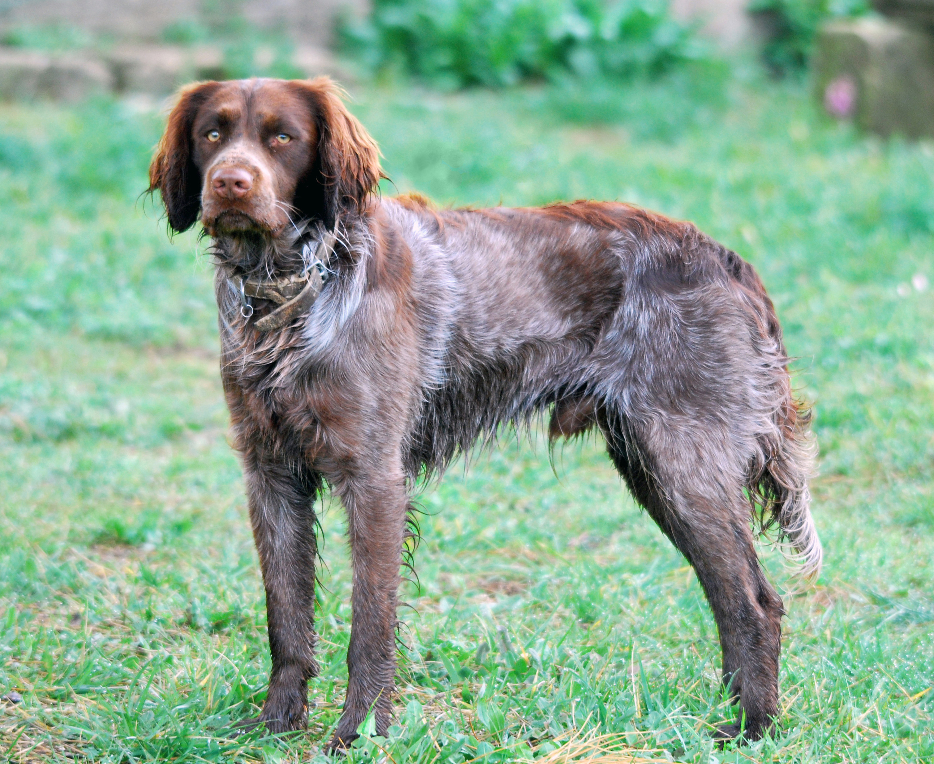 jeune épagneul de Saint Usuge